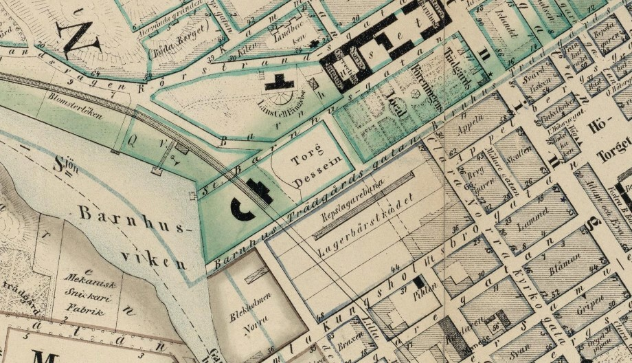 Del av 1867 års karta över Stockholm visande Norra Bantorget